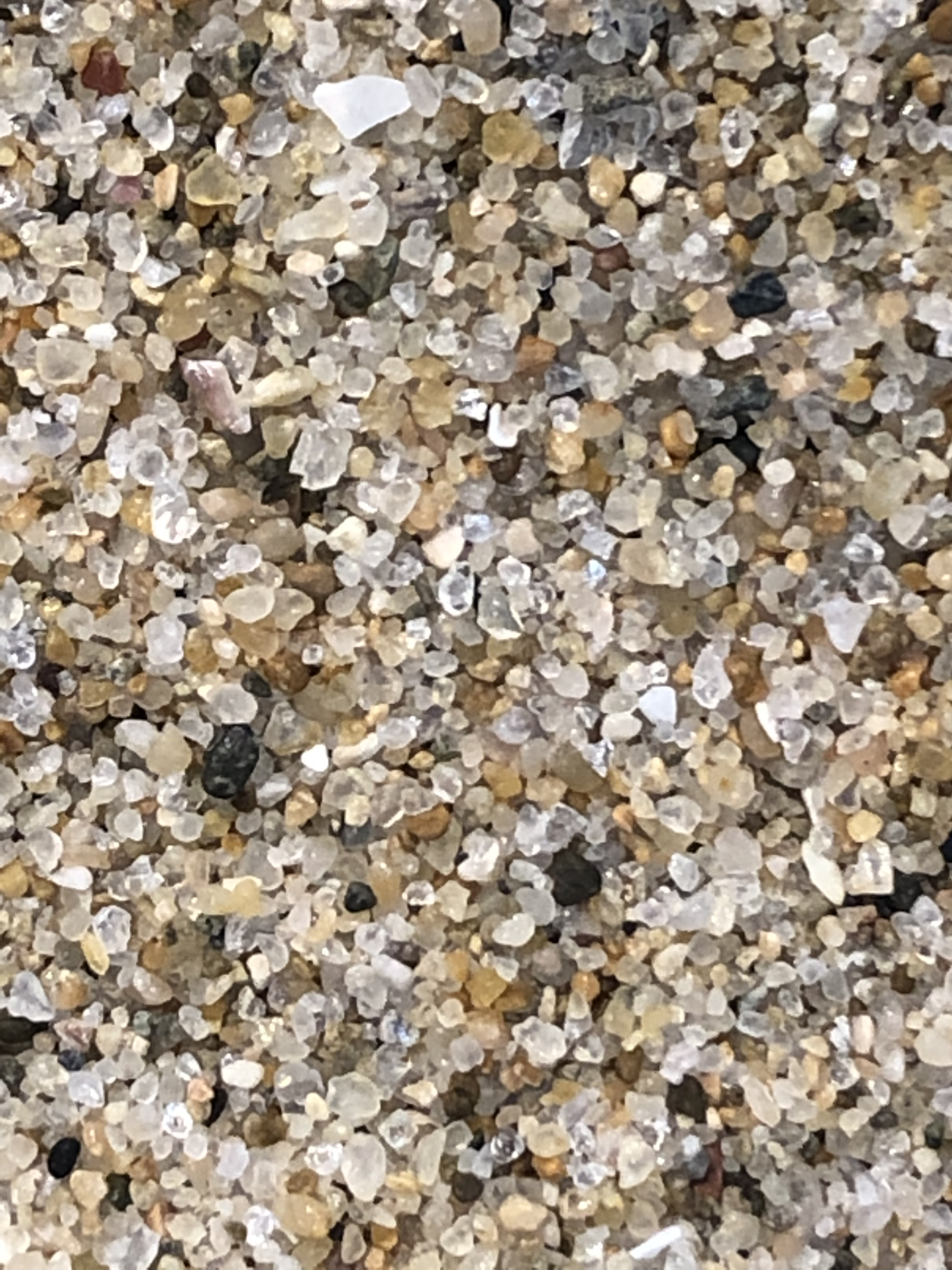 琴引浜の鳴き砂のサンプル（琴引浜鳴き砂文化館所蔵）